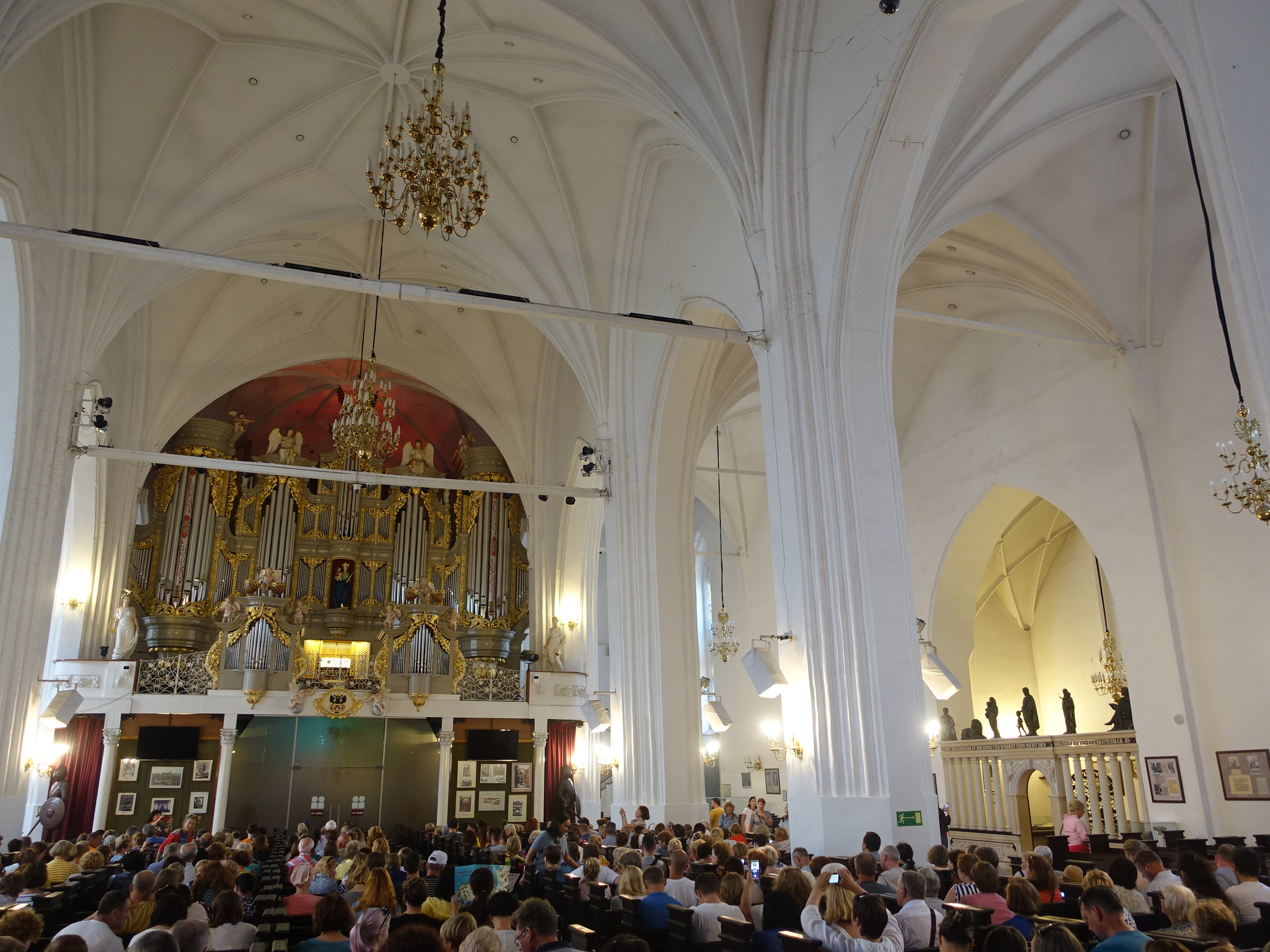 Konzert im Königsberger Dom